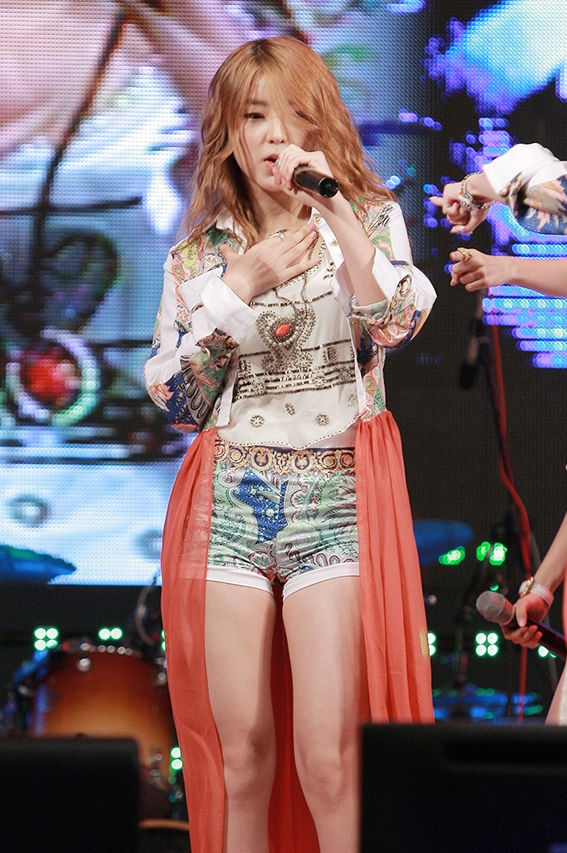 Sohyun performing in Paju on September 15, 2012.